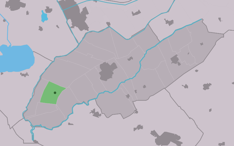 Kaartsje fan himrik fan Munnikebuorren